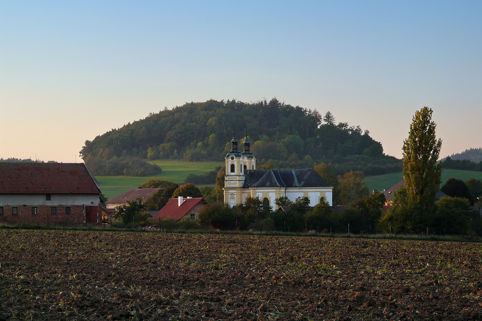 Ostružno a vrch Svatá Anna